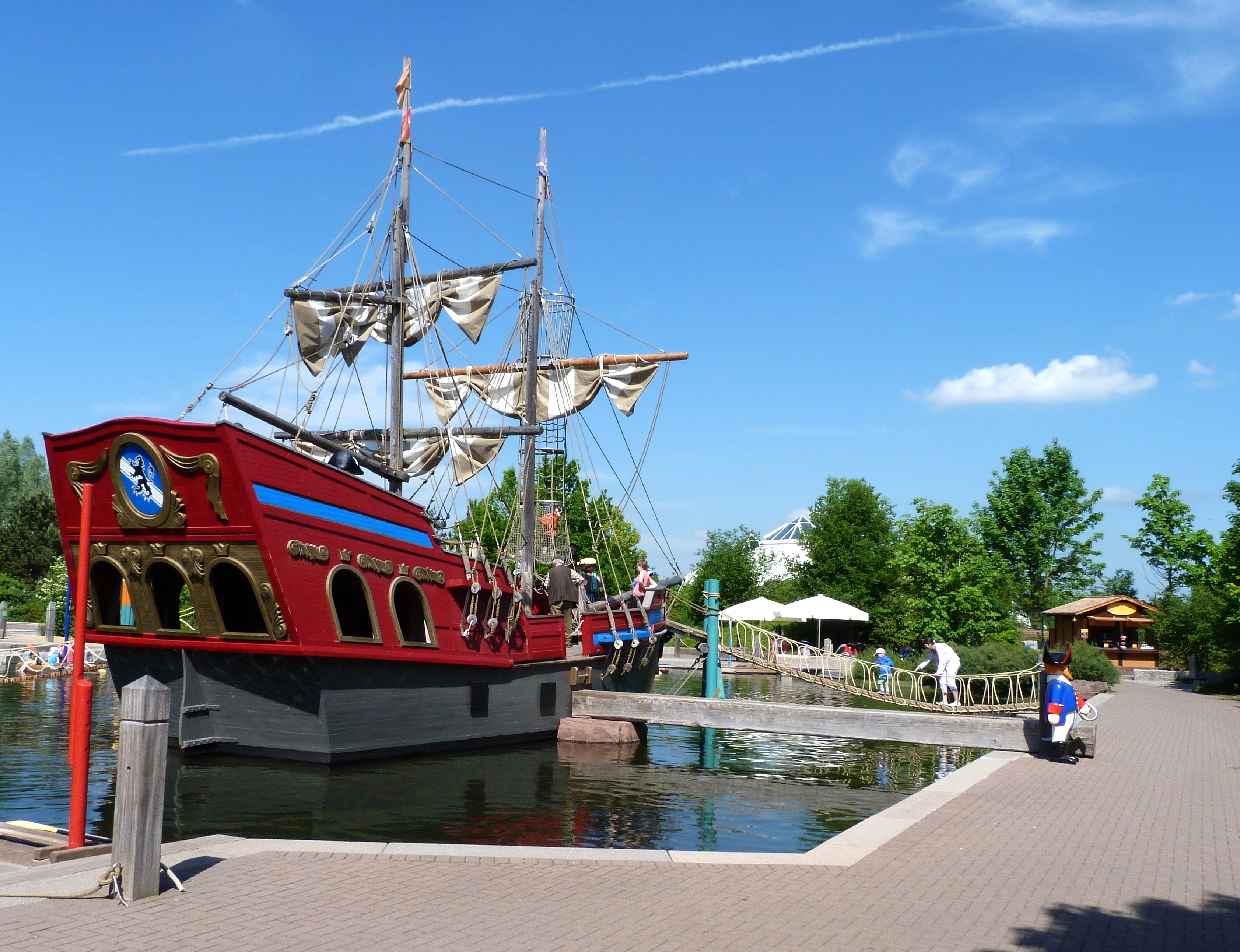 Piratenschiff